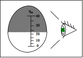 Esquema de un refractòmetre manual